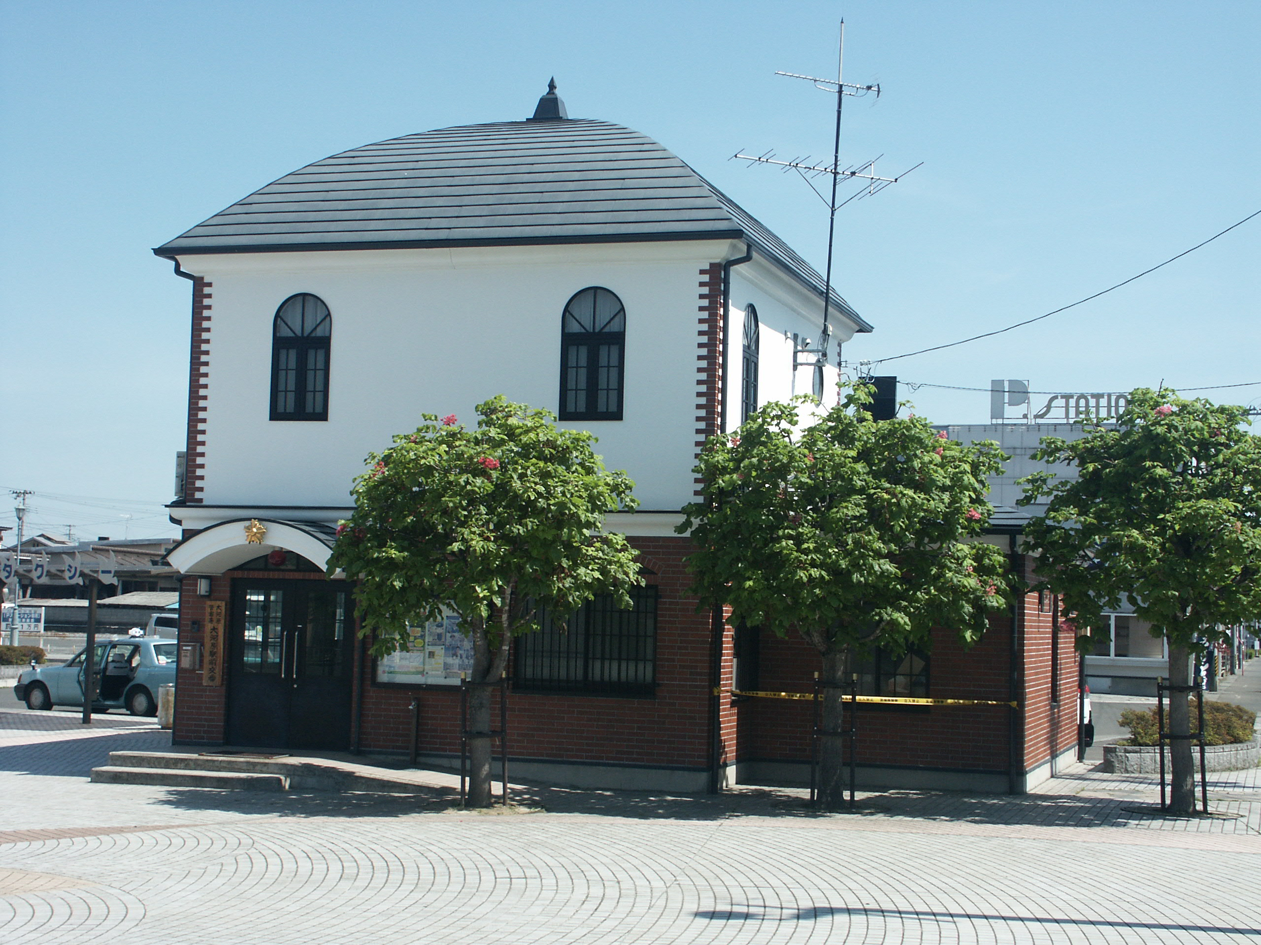 大河原警察署大河原駅前交番